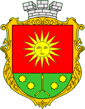 Герб міста Калинівка